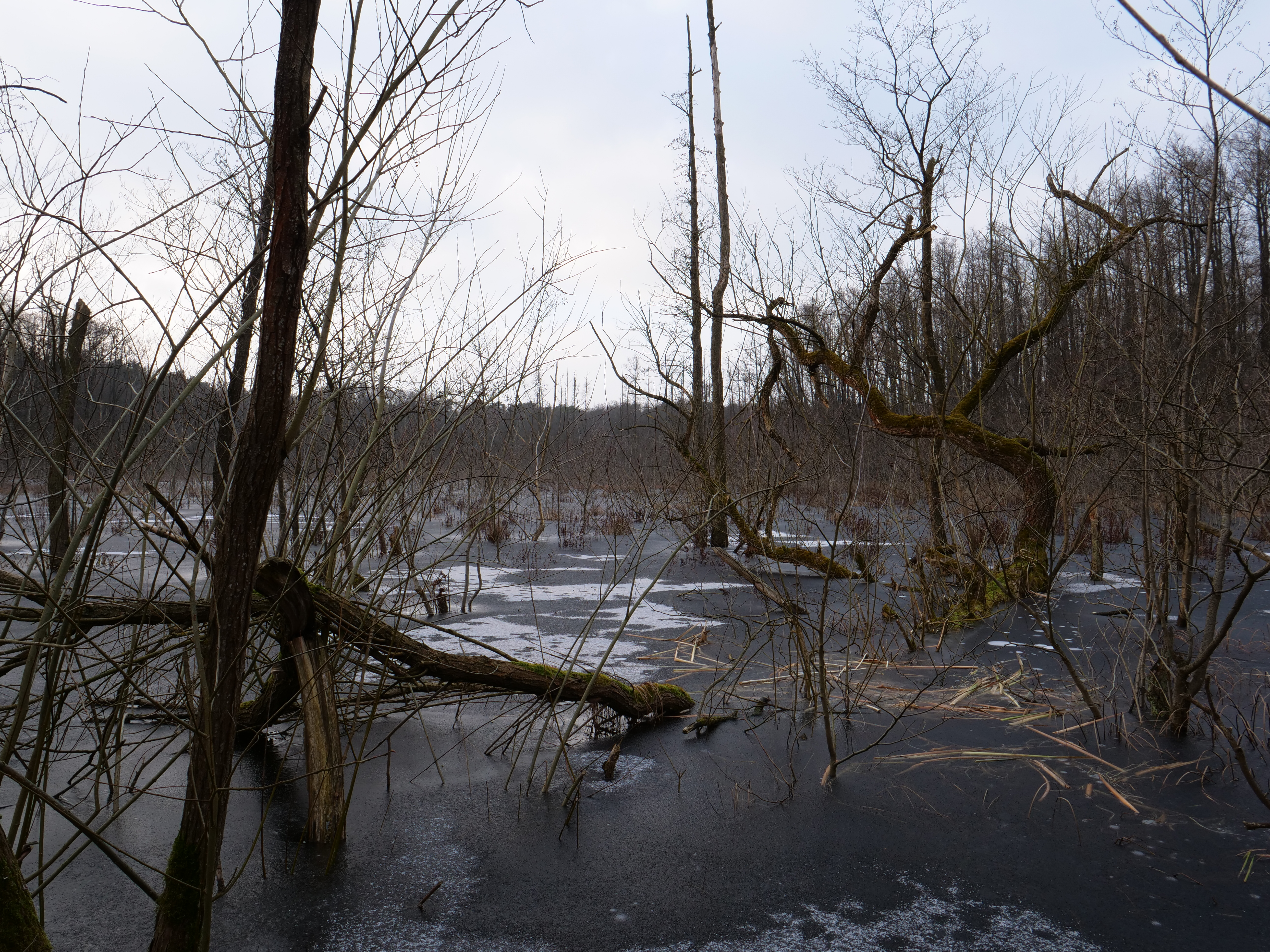 Das gefrorene Teufelsbruch neben dem durchquerenden Weg.